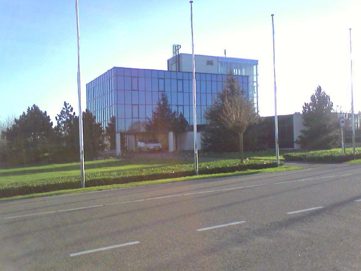 Alcoa Nederland - Drunen